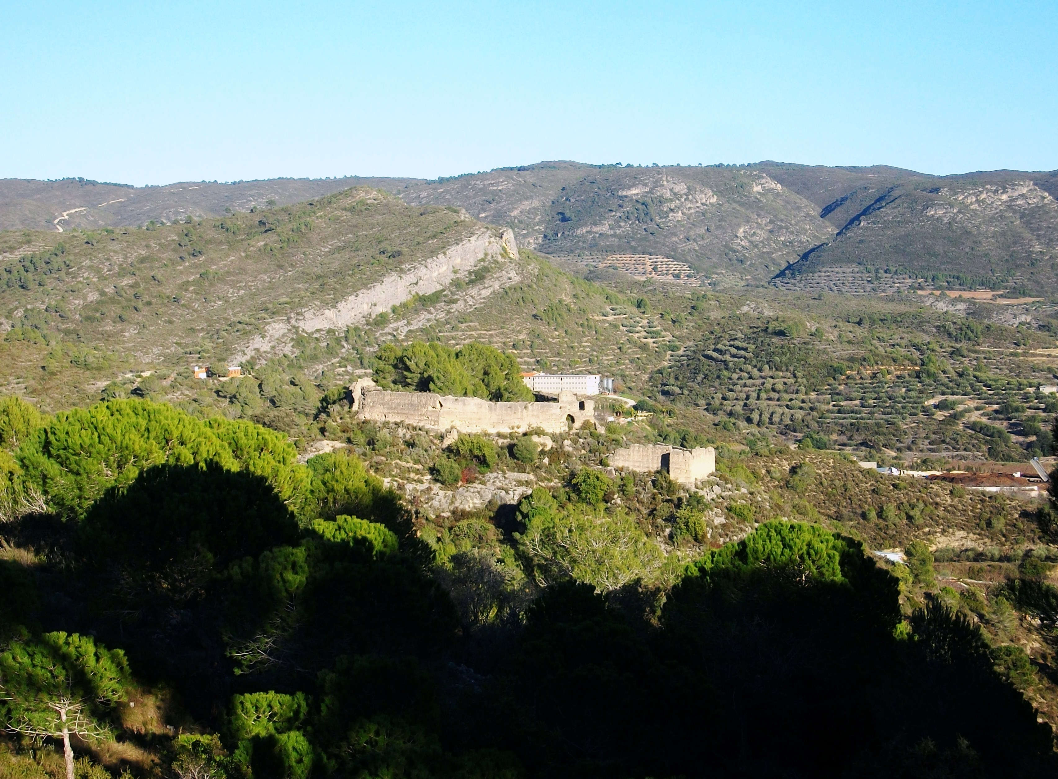 Castell de Xiu, Llutxent.